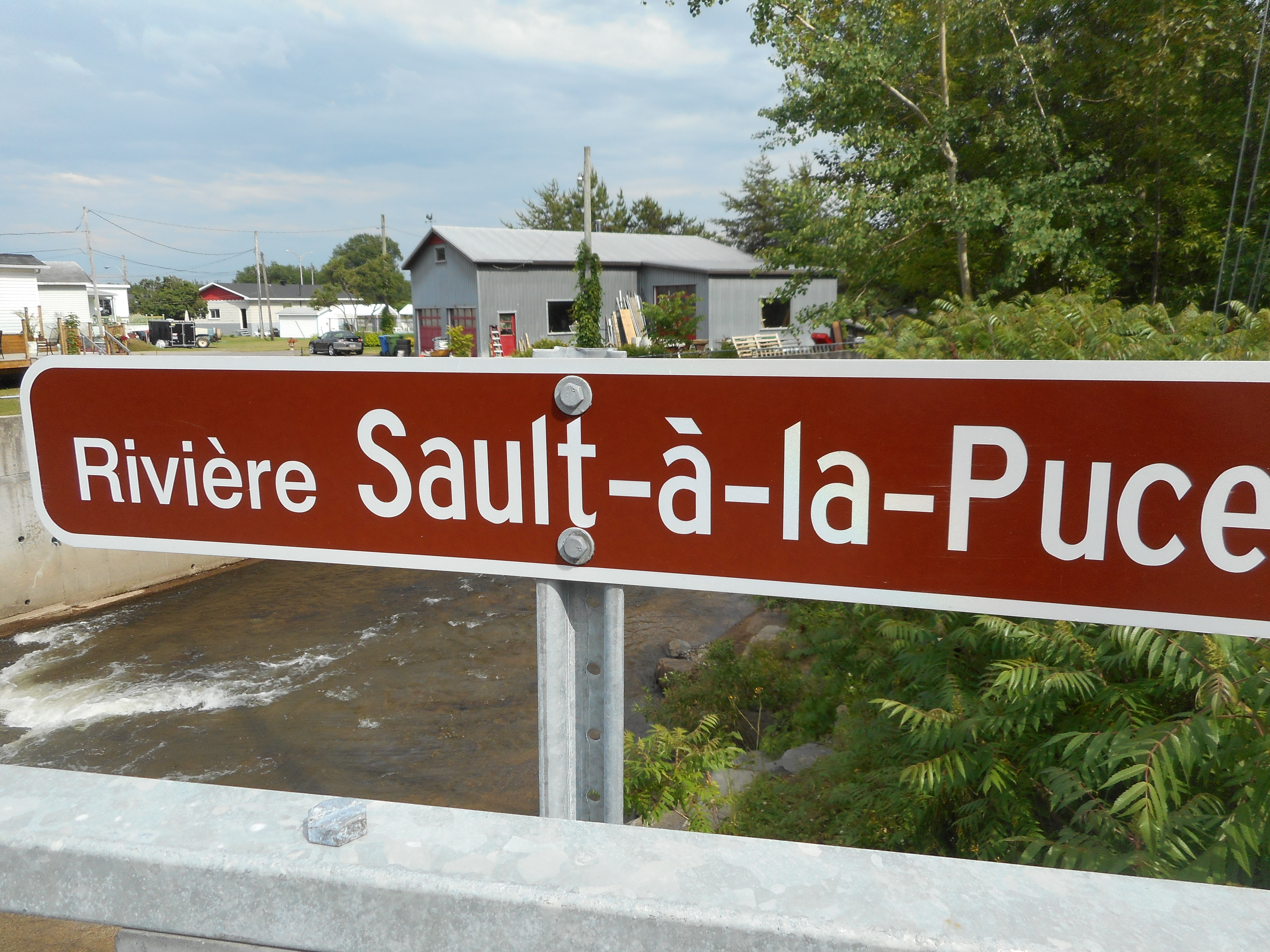 Rivière du Sault à la Puce, à Château-Richer Vue du pont de la route 360, regardant vers l'aval (le sud-est)